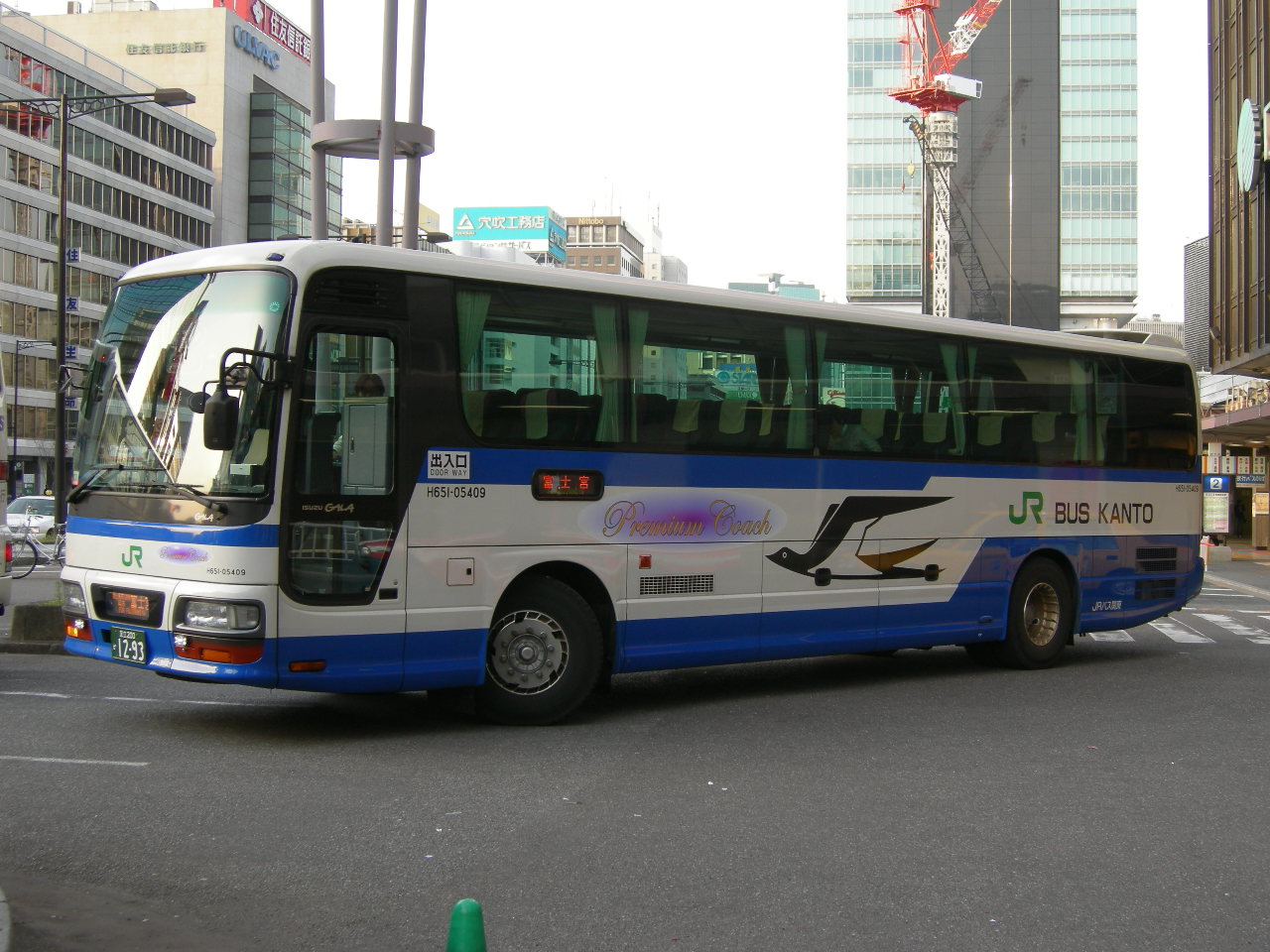 JRバス関東 いすゞKL-LV774R2社番:H651-05409（Gシート装備車）配置:JRバス関東東京支店（当時。現在は同社長野原支店に転属）